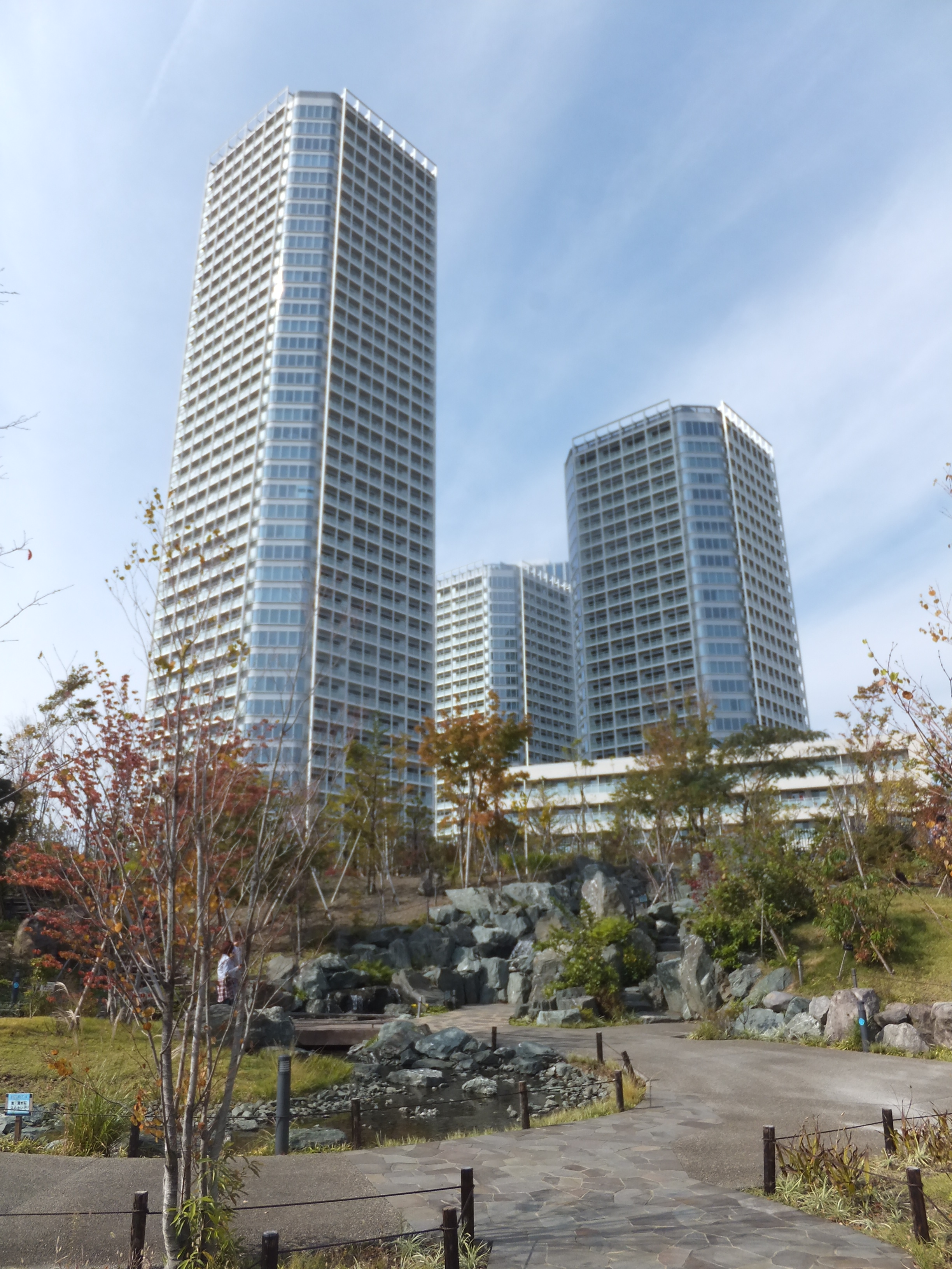 二子玉川ライズ・タワー&レジデンス。二子玉川公園より